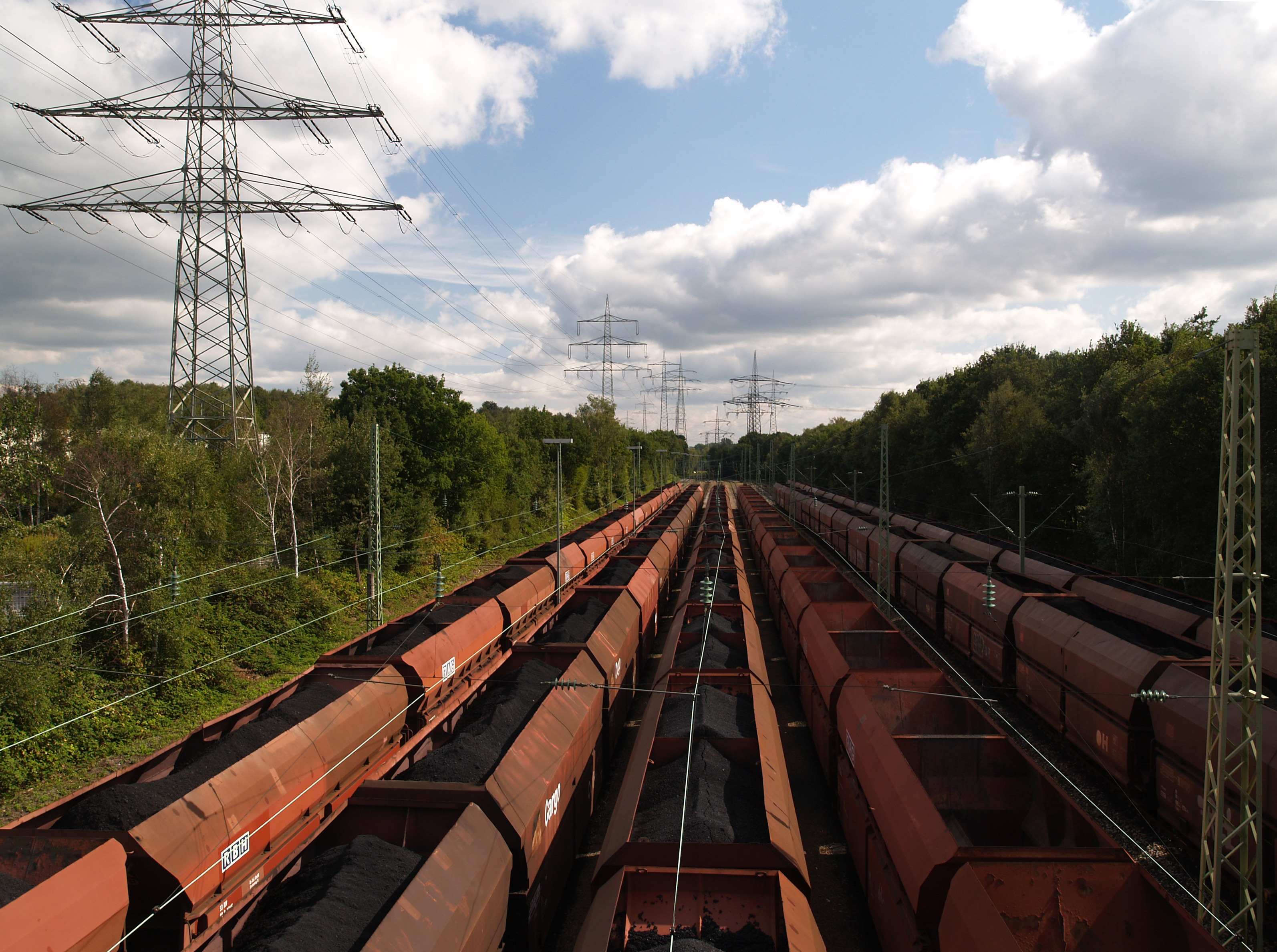 Kohlezüge stehen bereit für die Verwendung zur Stromerzeugung in Kraftwerken: Blick von der Brücke Cranger Straße nach Osten (vorne Herten, hinten Recklinghausen), Freileitungen (links Bl. 2613, hinten rechts Bl. 4302)